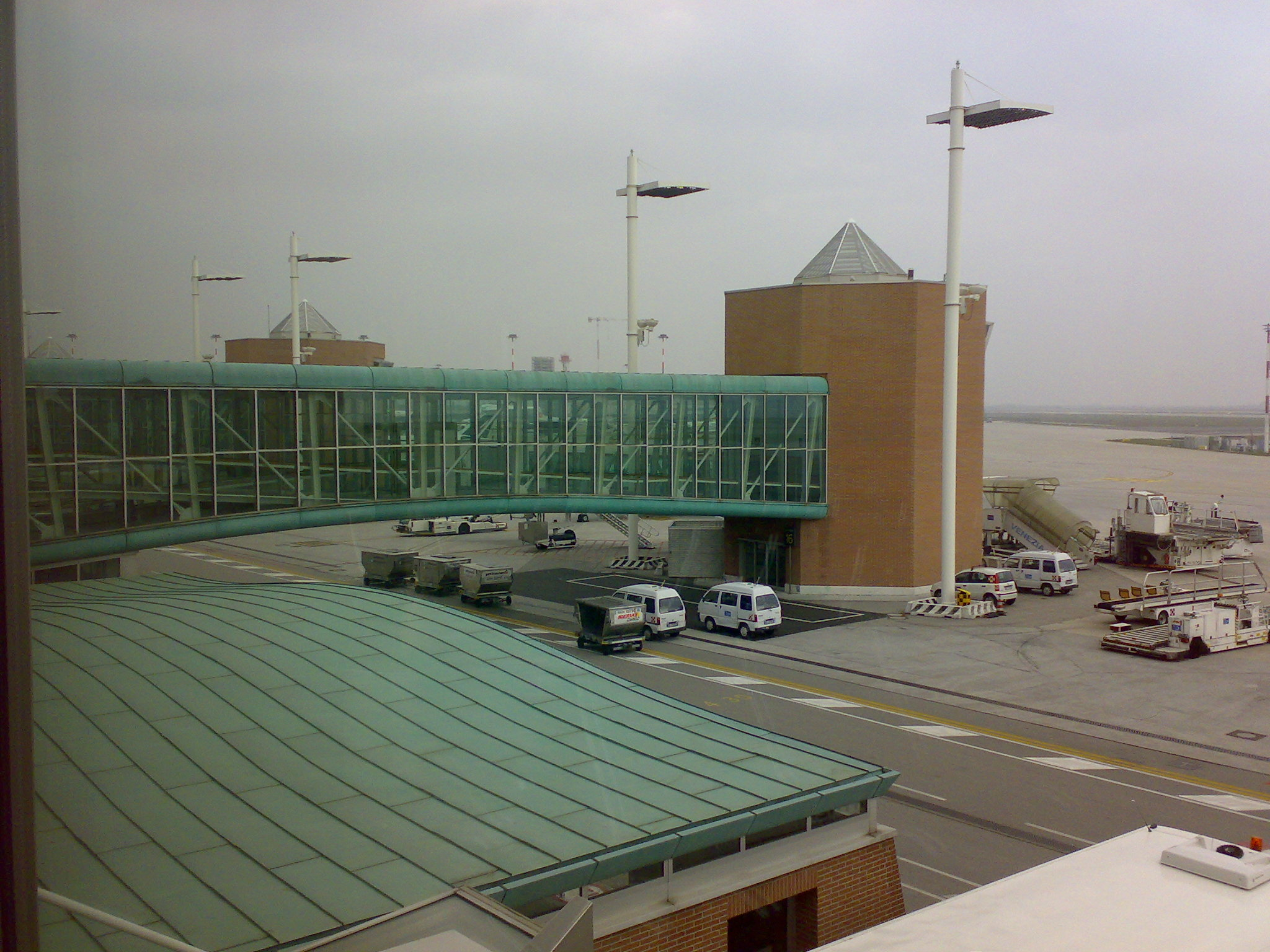 Aeroporto di Venezia, in partenza per la gita a Praga.